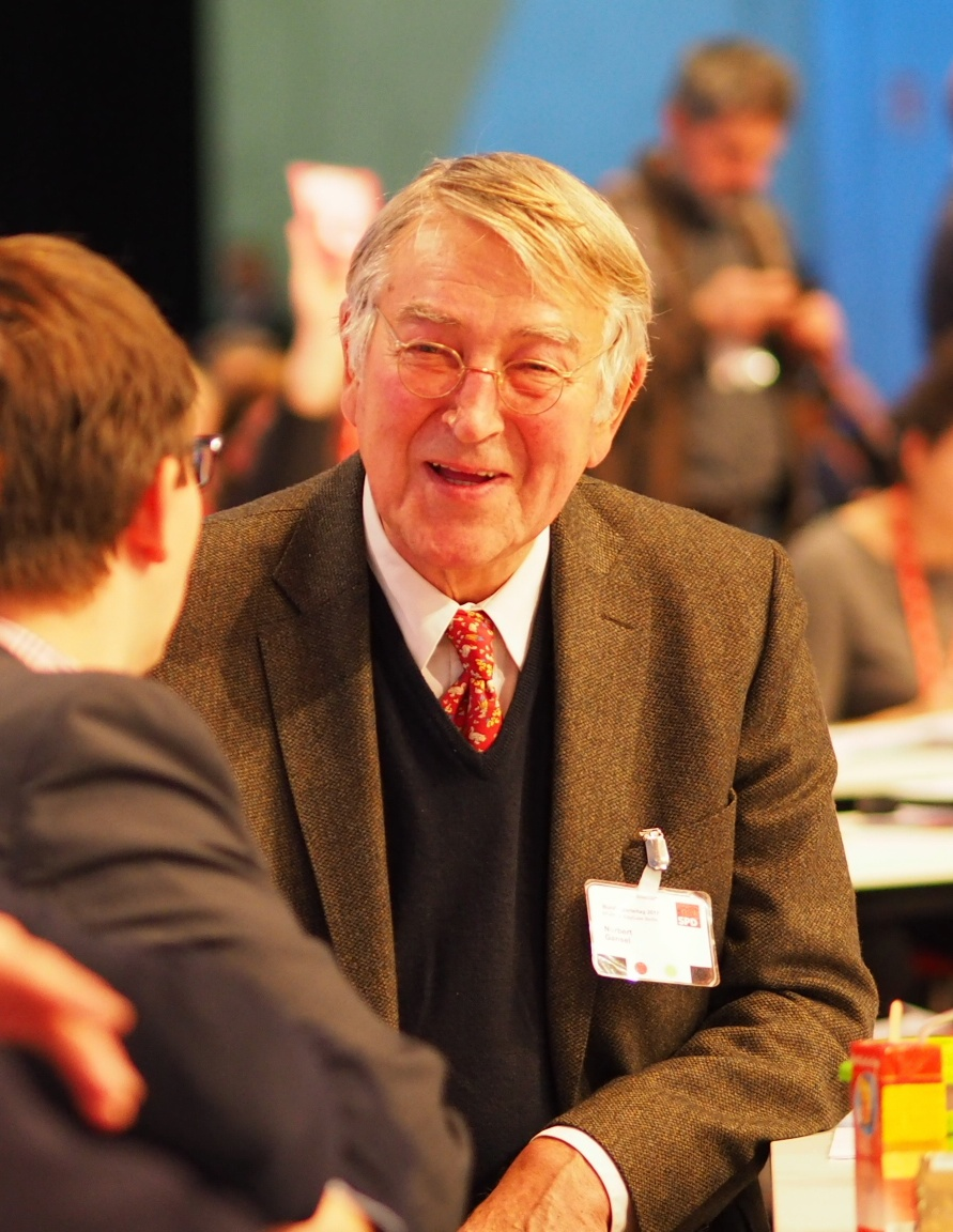 Norbert Gansel auf dem SPD-Parteitag in Berlin.